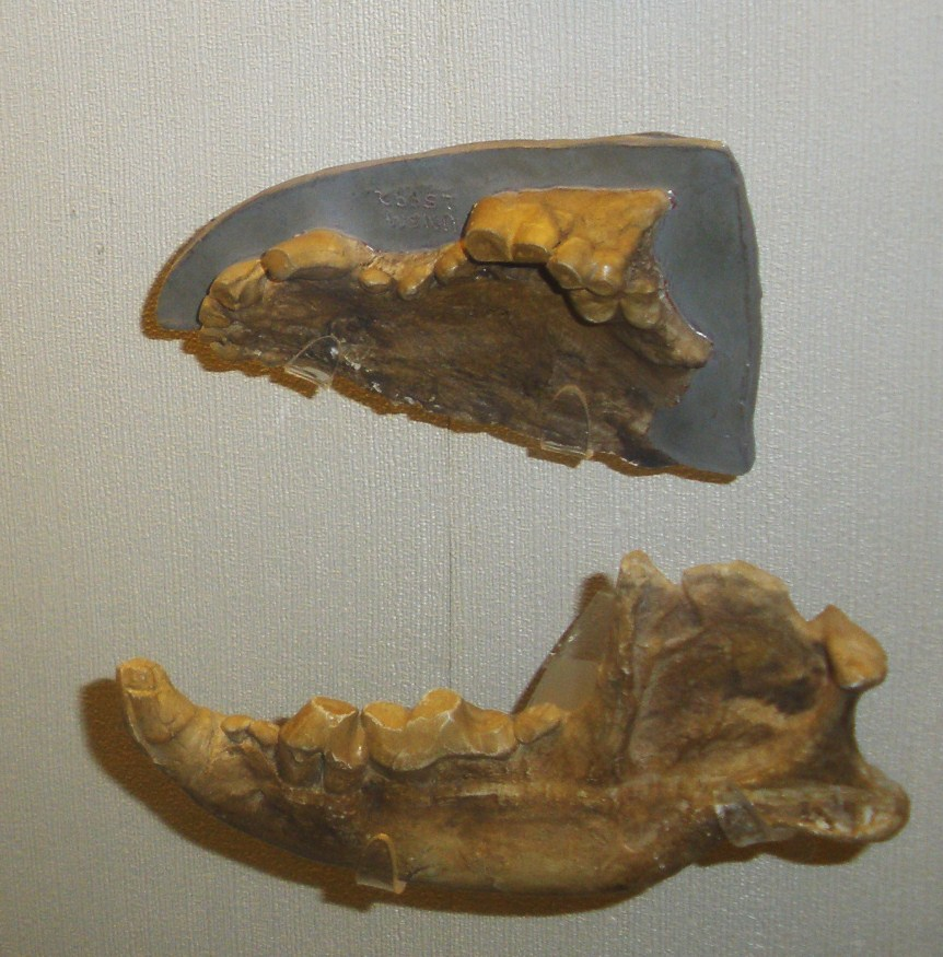 Fossil of Borophagus, an extinct mammal - Took the picture at Museo di Paleontologia di Firenze